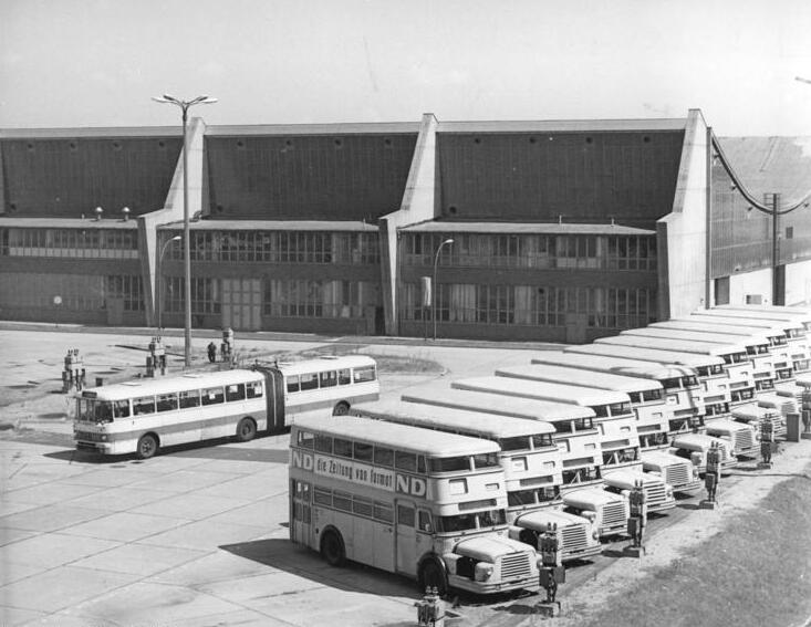 Zentralbild-Junge-21. 7. 69-sche-Berlin: Im Busbahnhof Weissensee stehen die Fahrzeuge in "Reih und Glied".